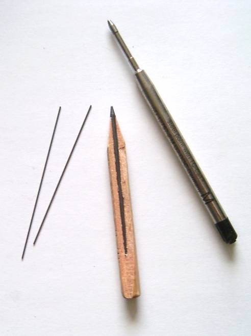 Untersschiedliche Minen von Schreibgeräten